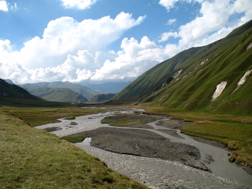 Trusso-Schlucht